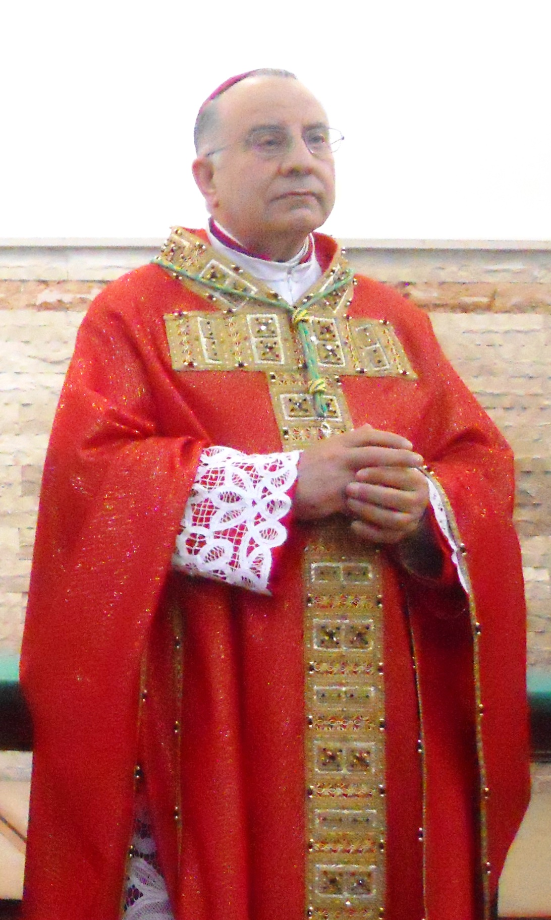 Arcivescovo Giovanni Battista Pichierri.